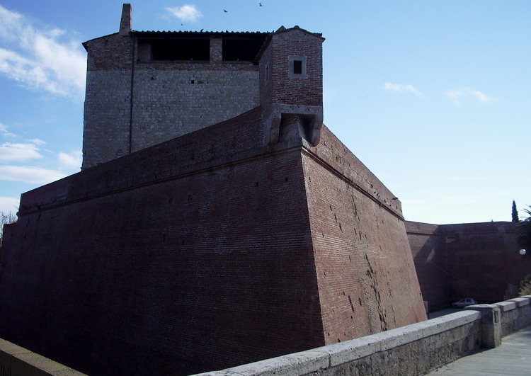 Bastione di Santa Lucia Grosseto